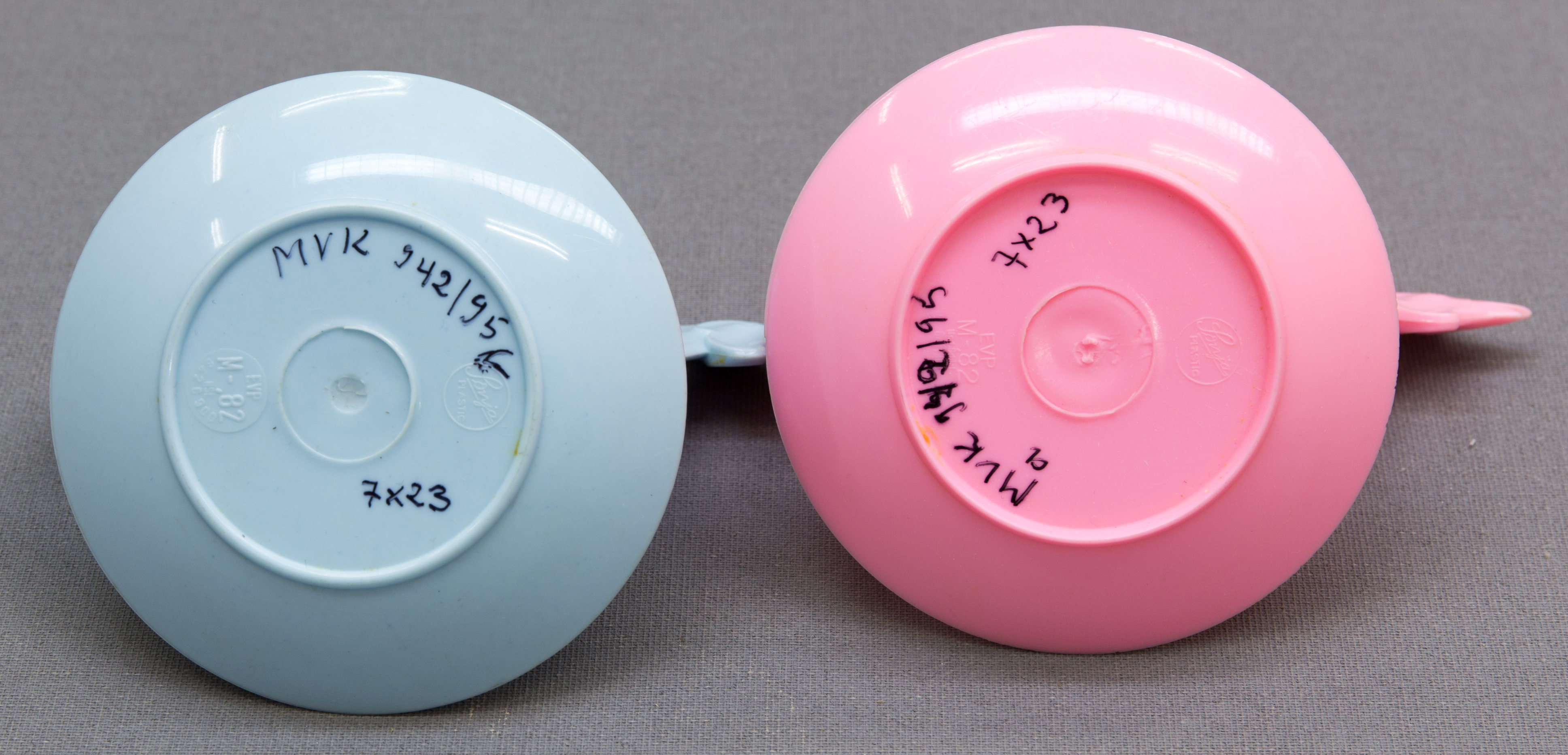 MVK 942/95